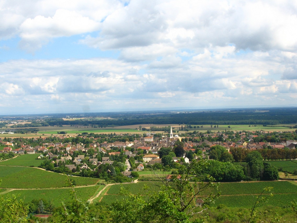 Givry, 3 600 hab. en Saône et Loire, son vignoble réputé de la Côte chalonnaise une dizaine de km à l'ouest du chef-lieu d'arrondissement, vus depuis colline de Varanges vers statue de la Madone.